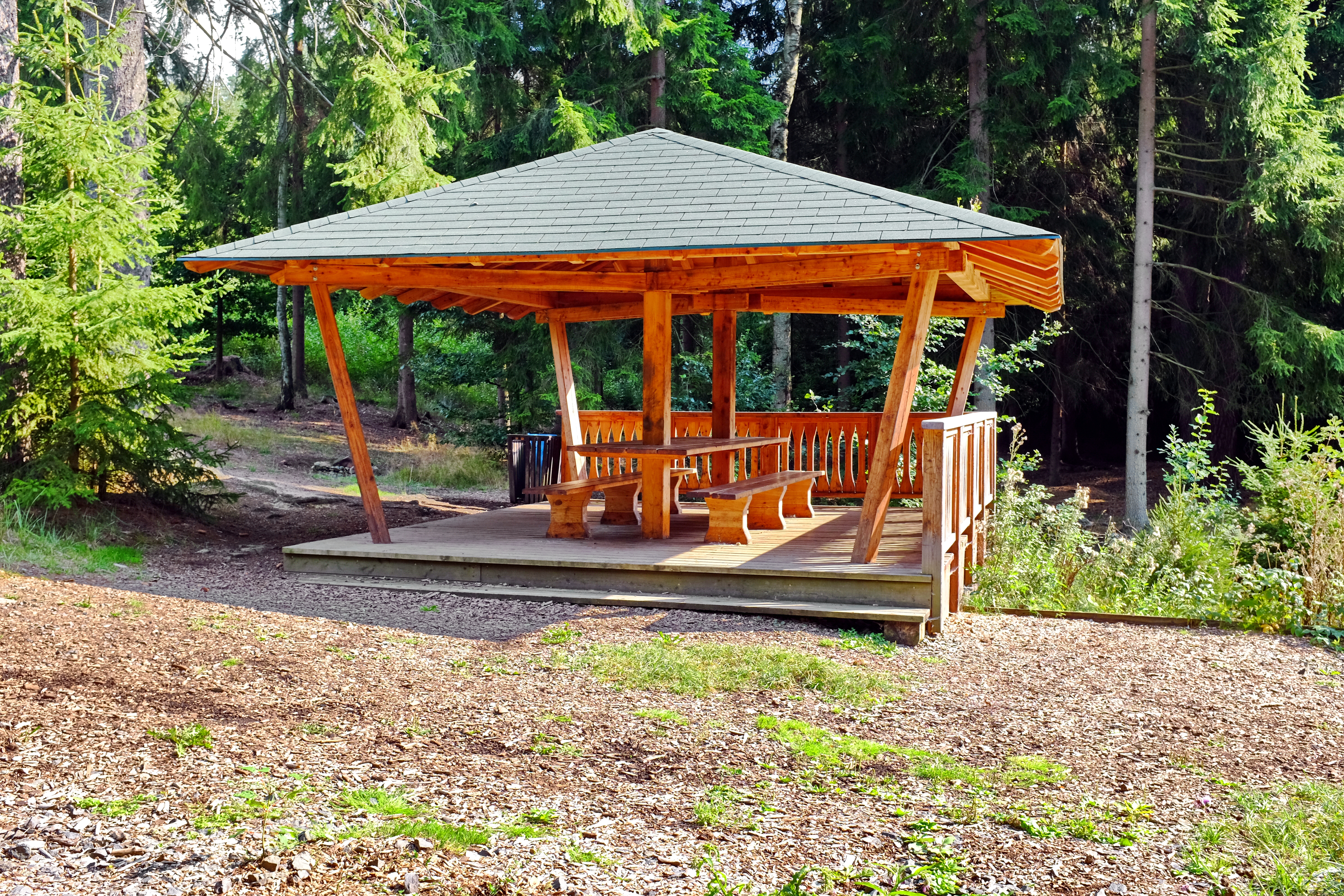 Karlovarské lázeňské lesy, altán u rybníka Linhart